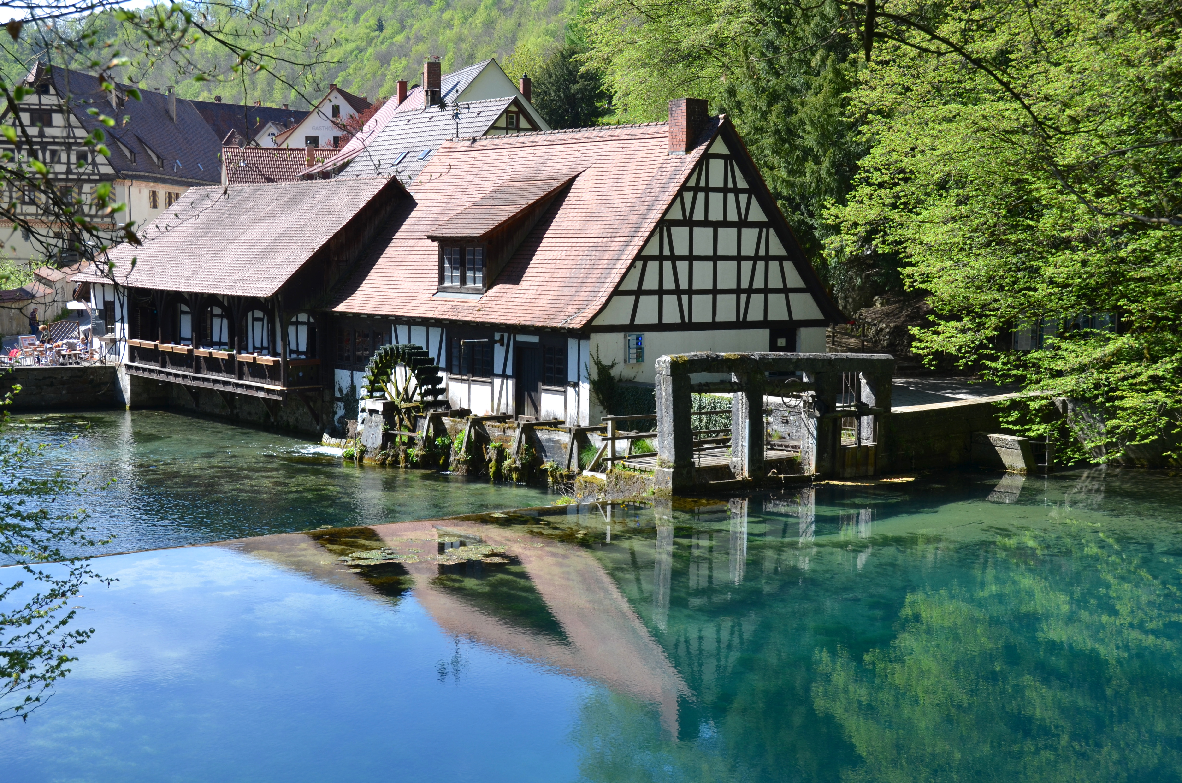 (LSG:BW-4.25.108)_Blaubeuren und FFH-Schutzgebiets-Nr. 7524341 Hammermühle am Blautopf in Blaubeuren (2019)